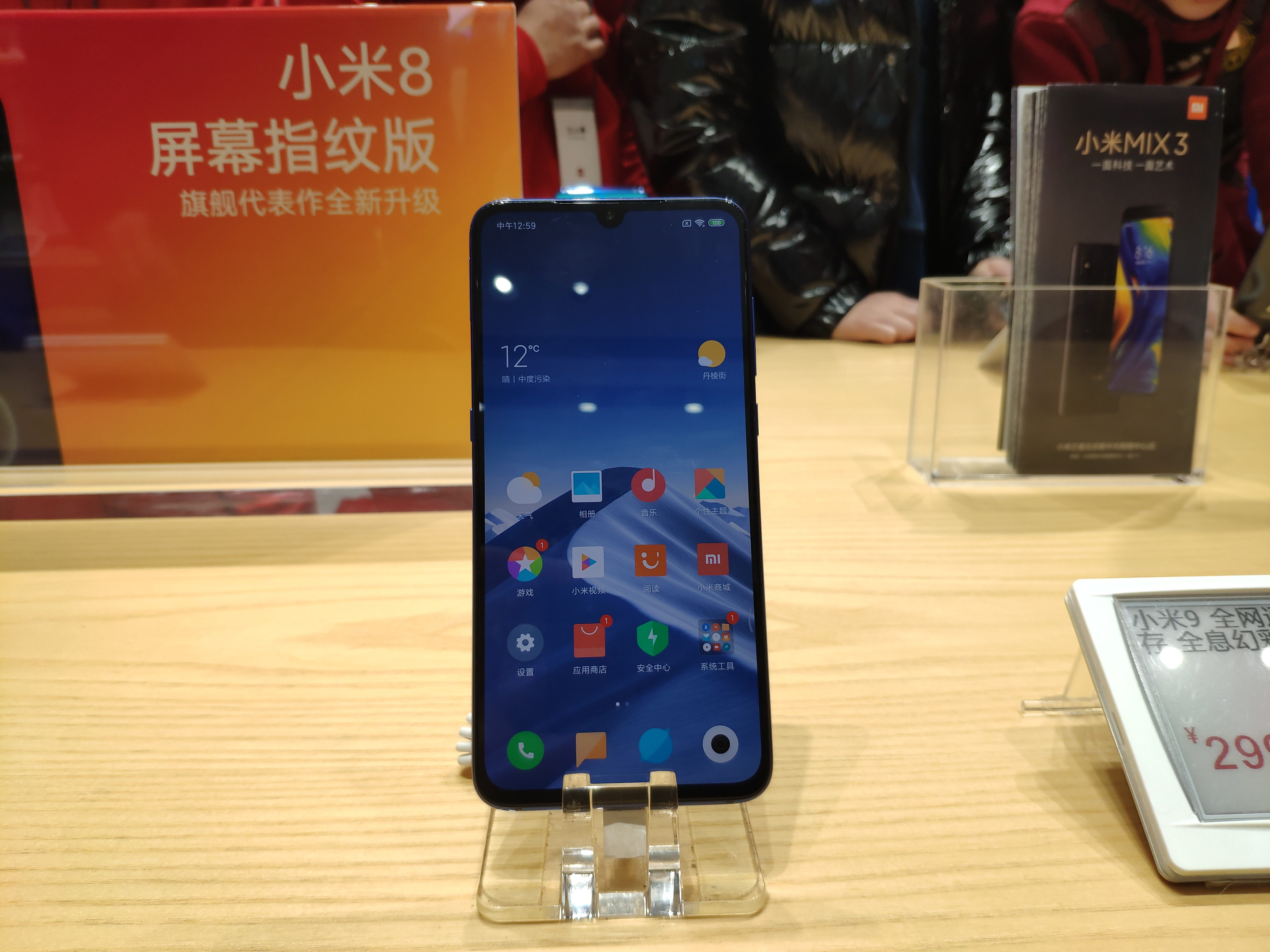 Xiaomi Mi 9